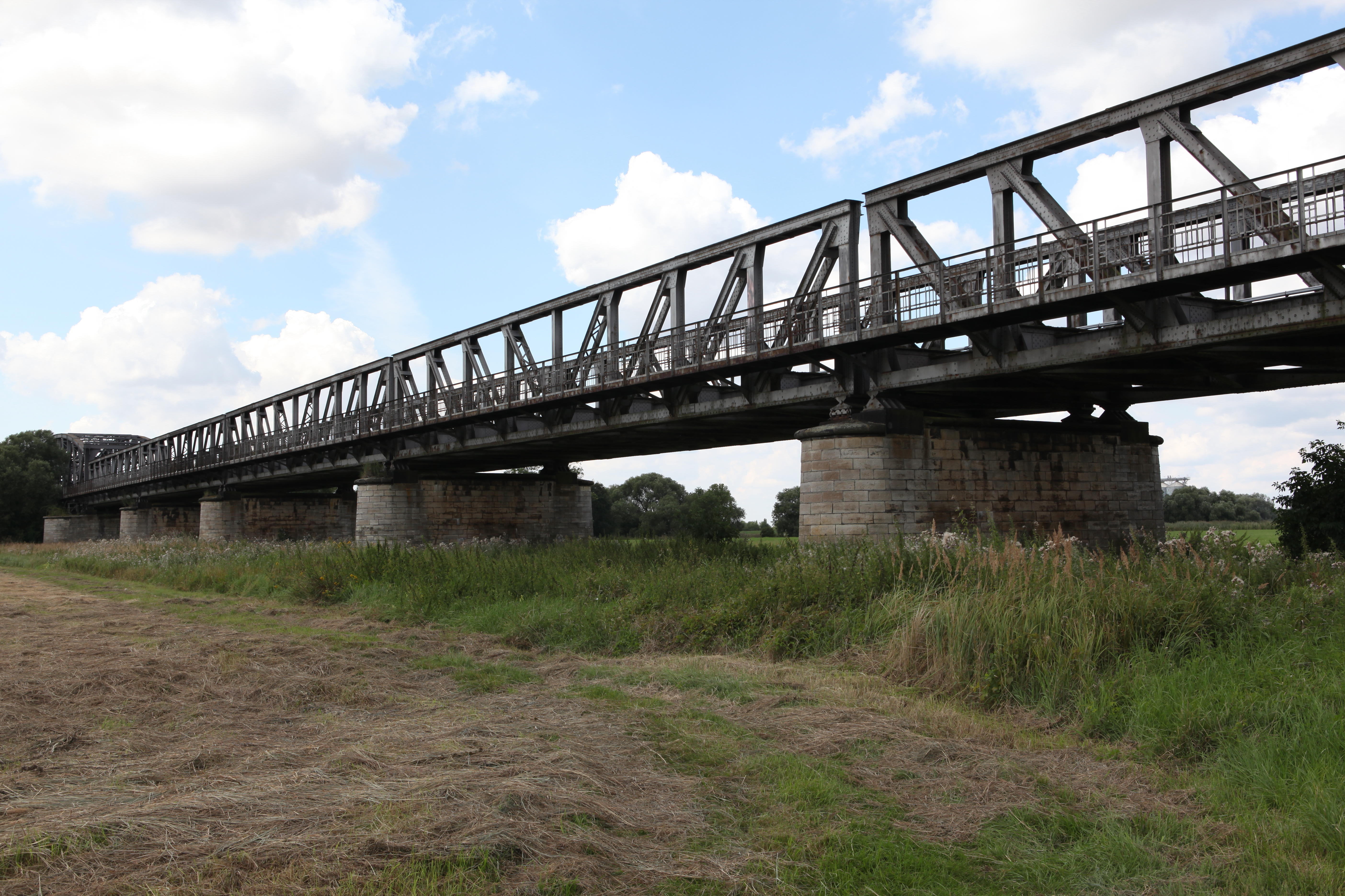 Elbebrücke Barby